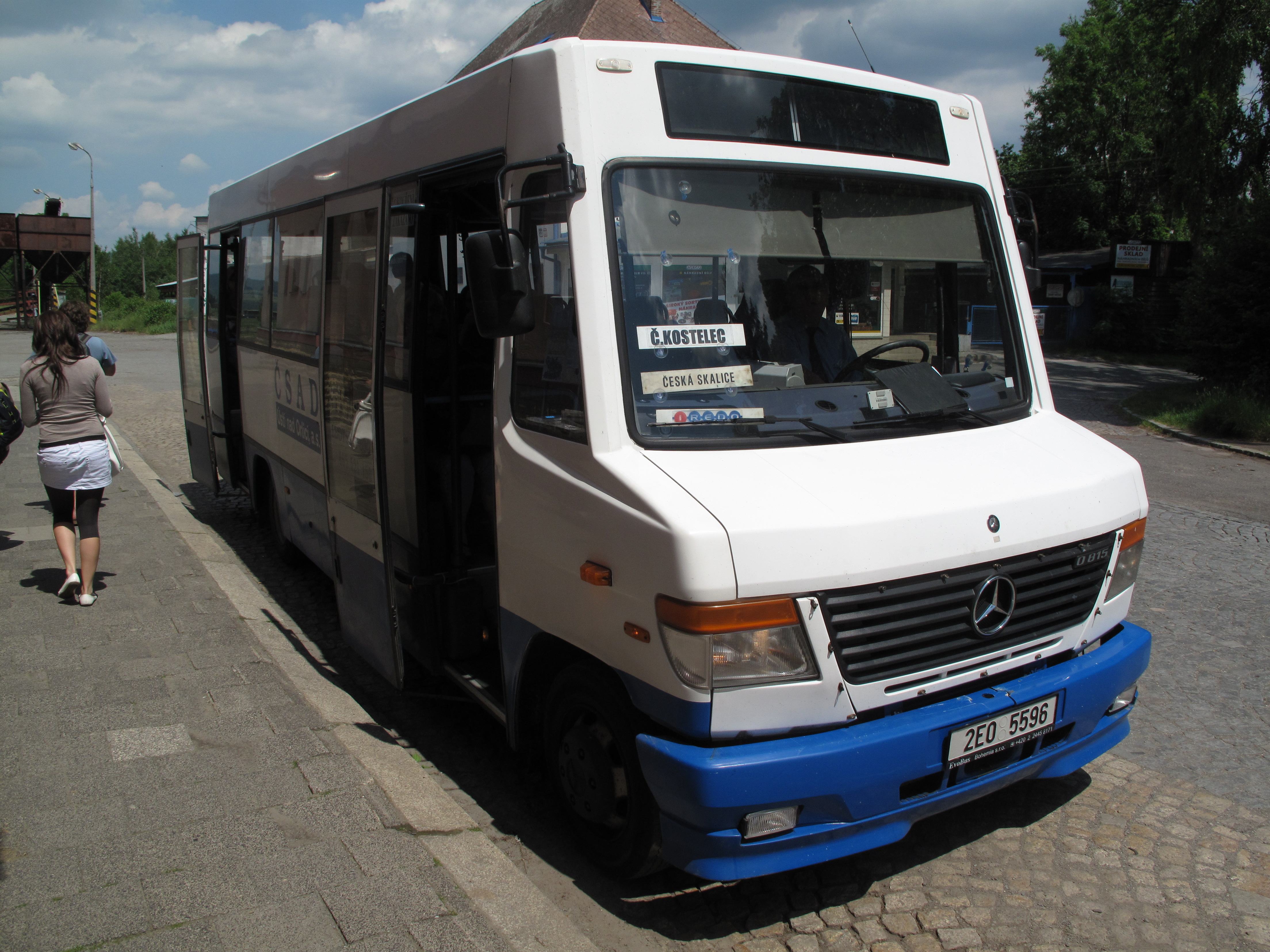 Autobus v Červeném Kostelci u vlakového nádraží